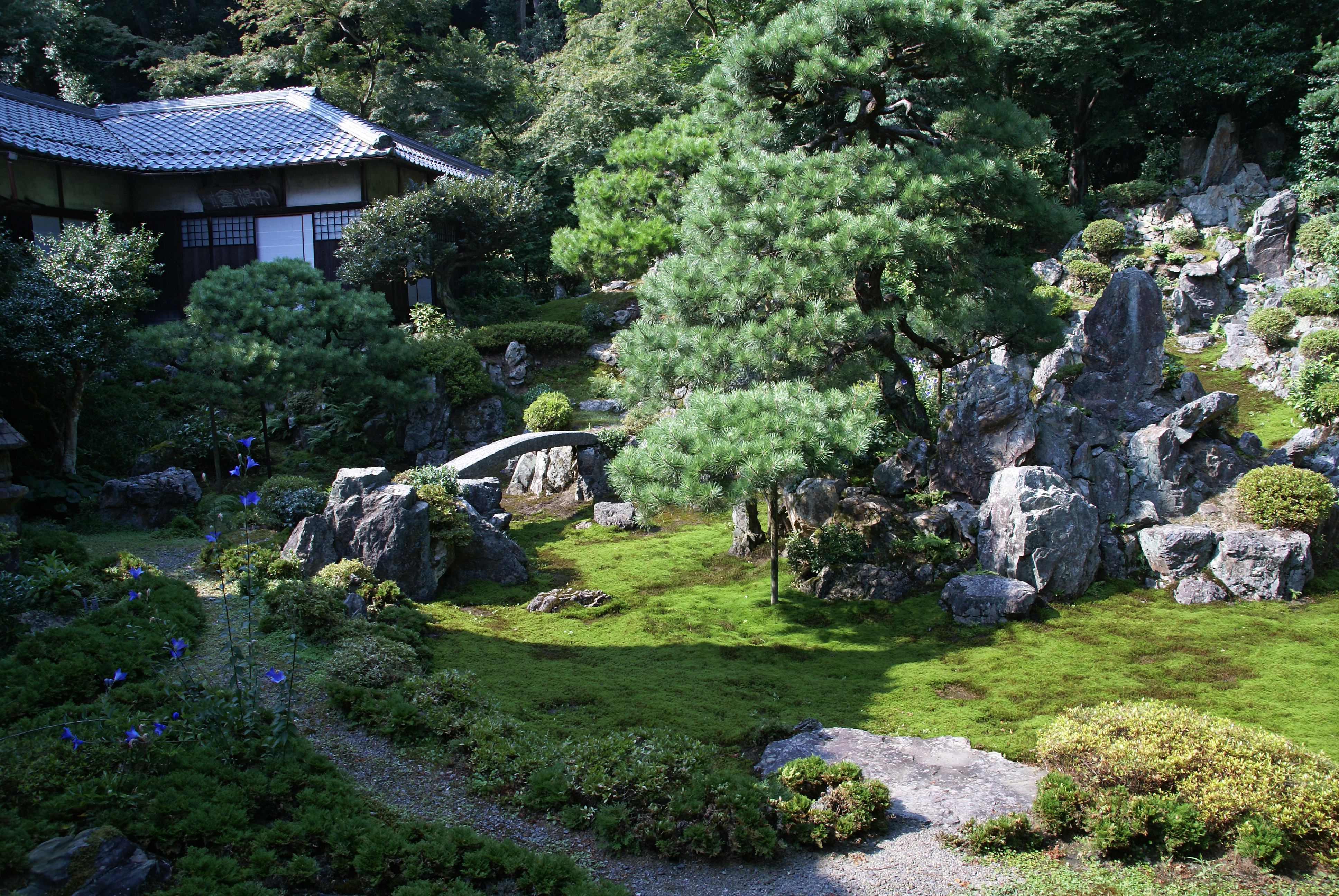 Seiganji in Maibara, Shiga prefecture, Japan